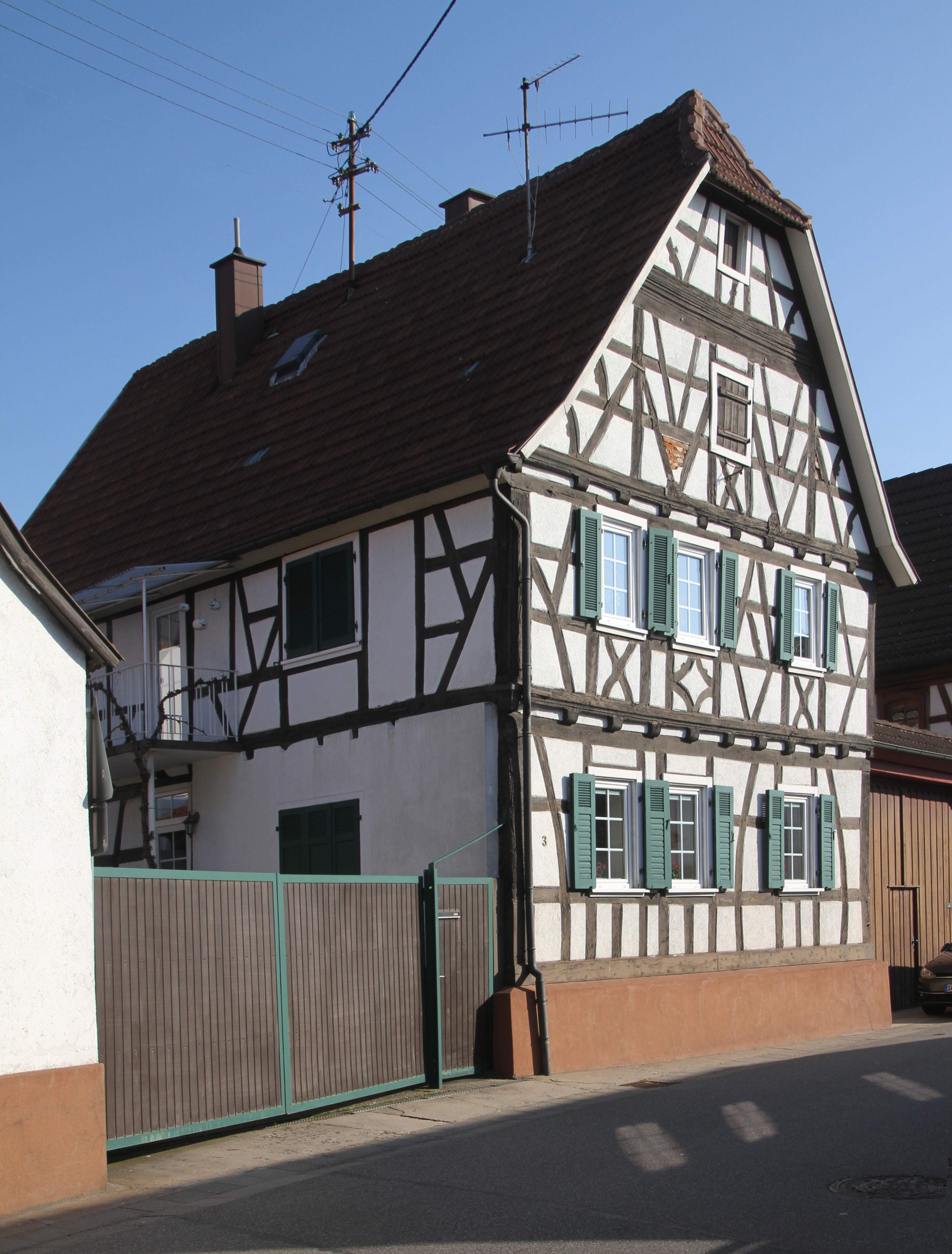 Rohrbach (Pfalz)